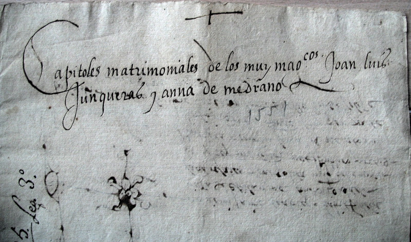 Capitulaciones matrimoniales en un manuscrito del siglo XVI